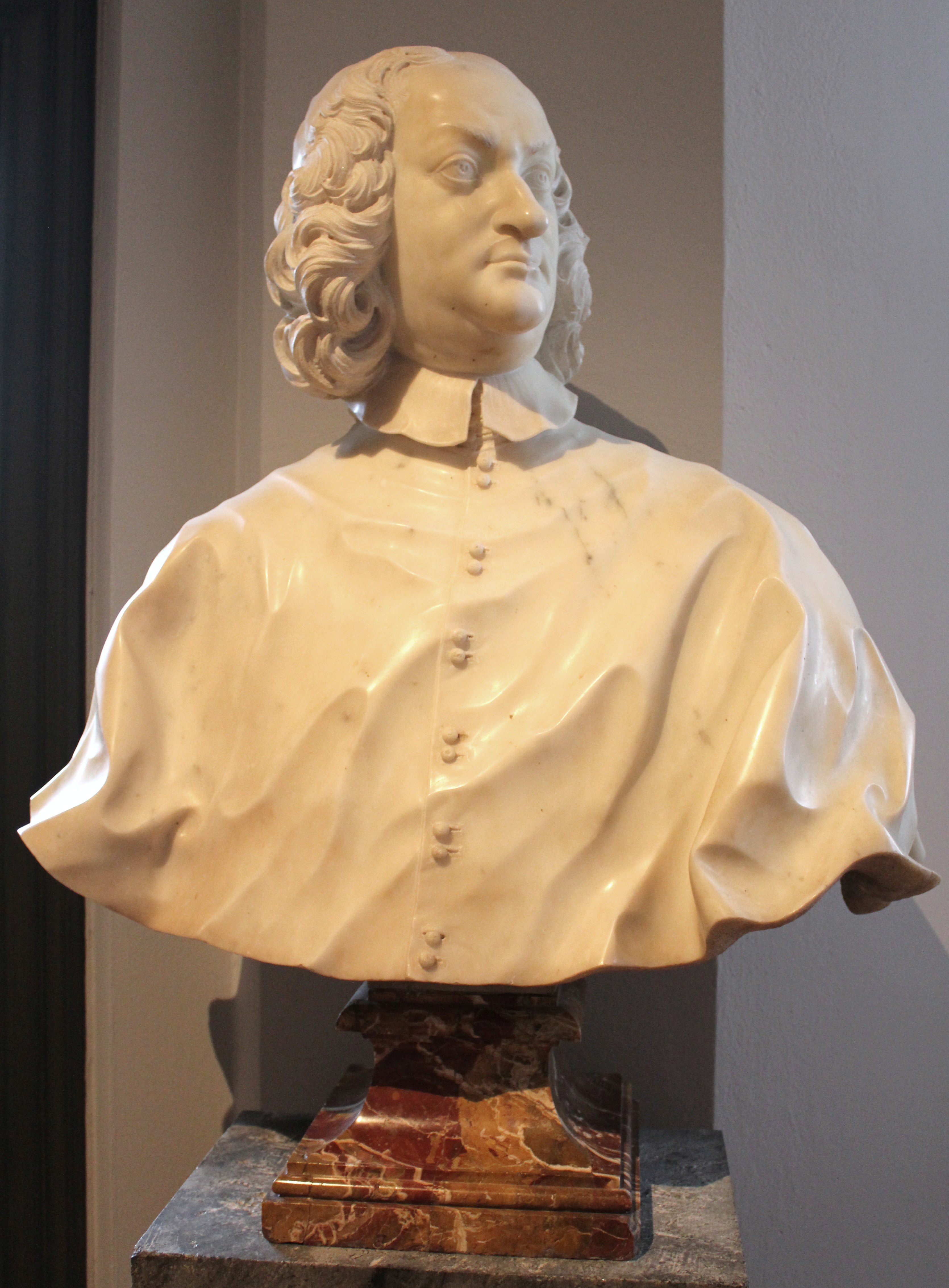 Kardinal Decio Azzolino av Pietro Balestra, cirka 1670.